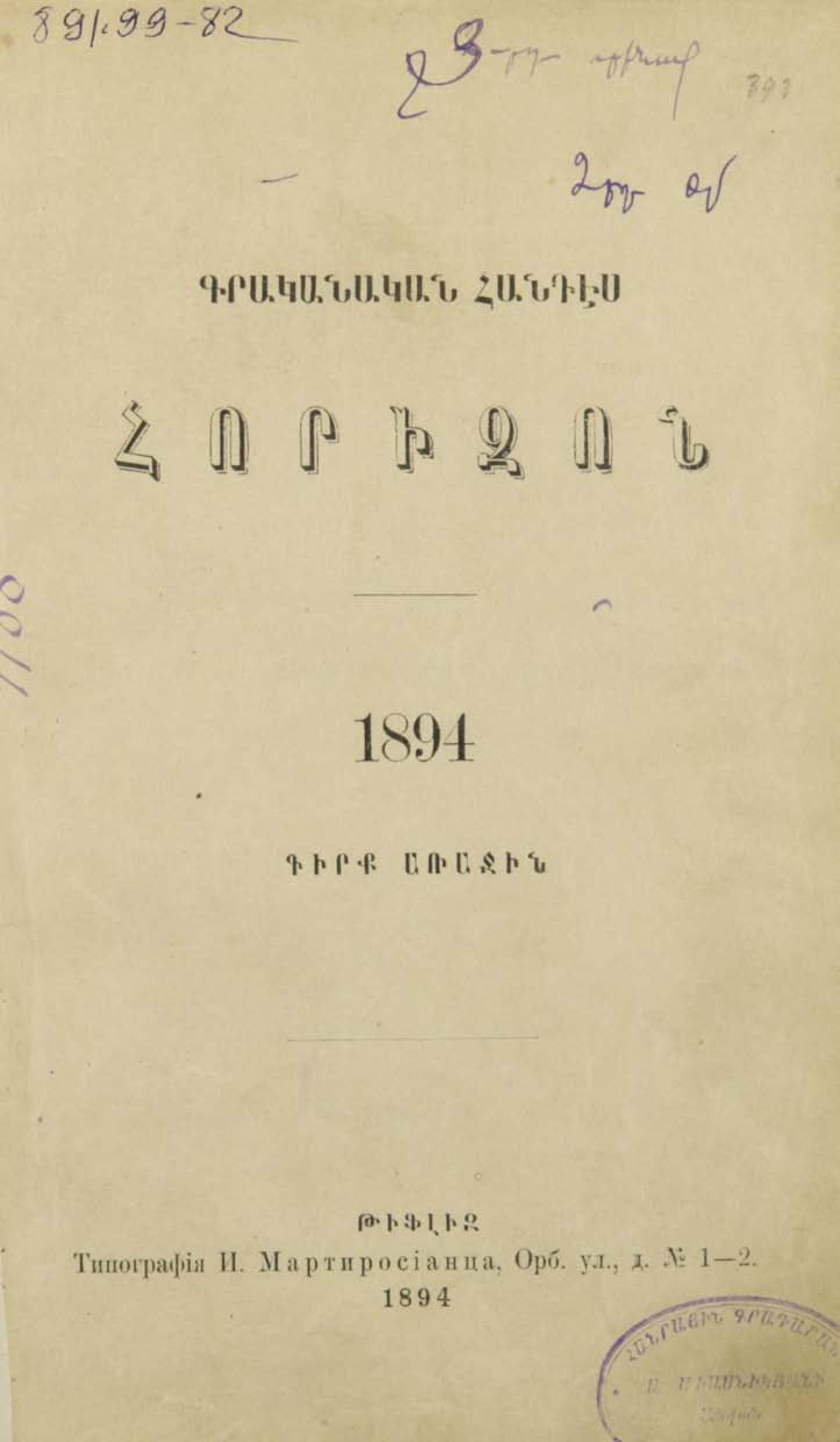 The cover of Horizon journal